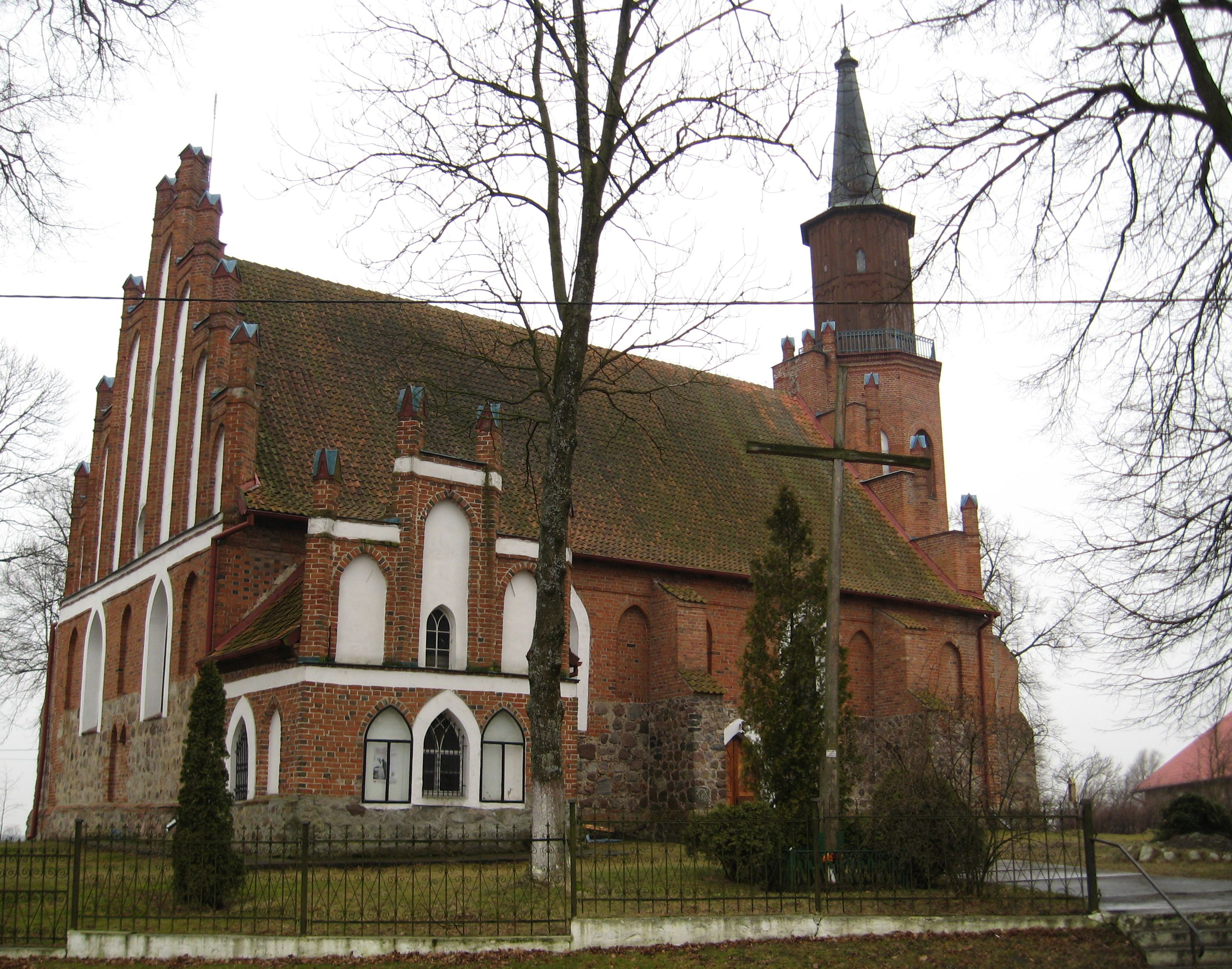 Winda in Poland